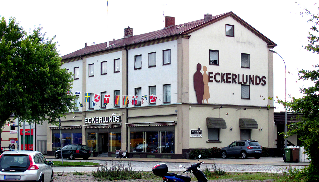 Eckerlunds Kläder. Österlens största modehus. Eckerlunds har funnits i Tomelilla i 90 år.